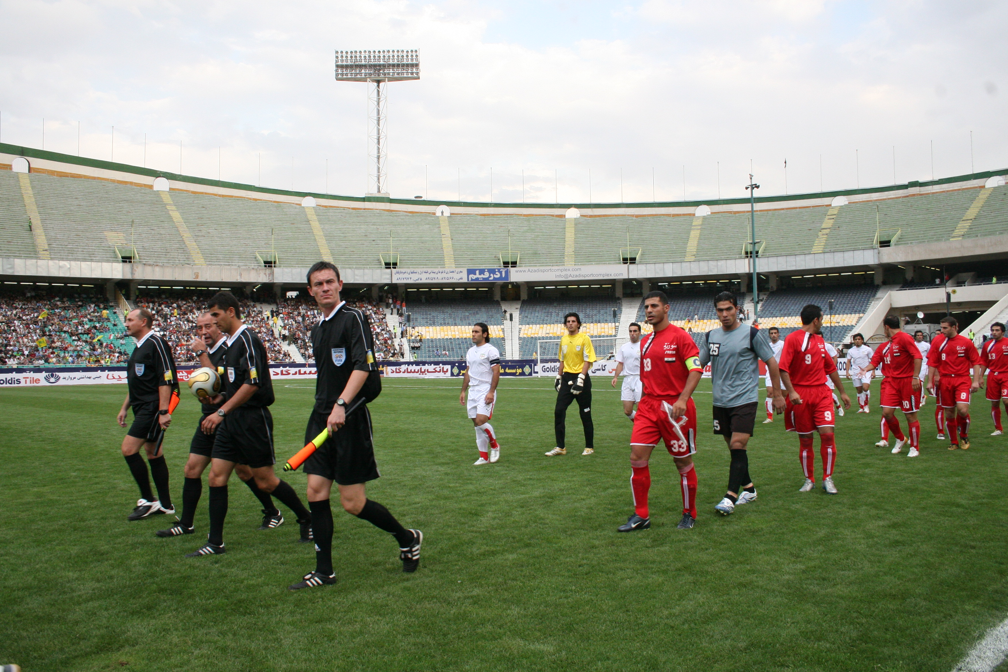 تصویری از ورزشگاه آزادی تهران